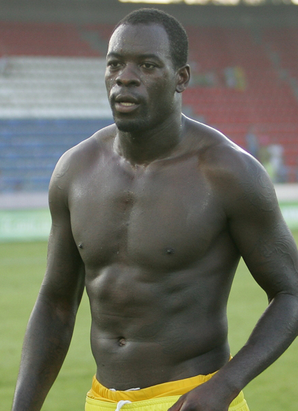 Кристофер Самба